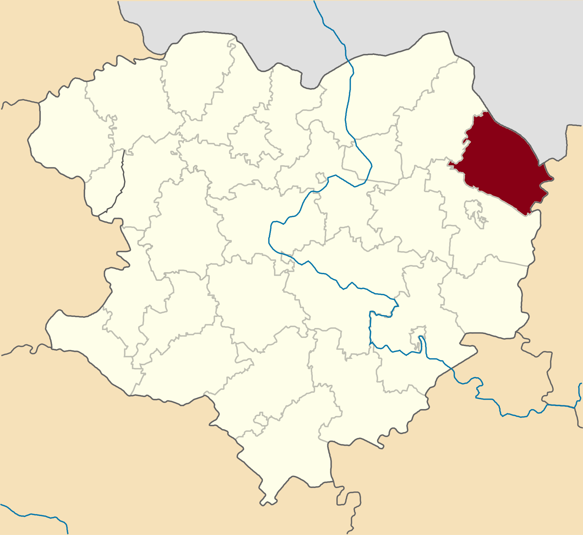 Dvorichanskyi-Raion map